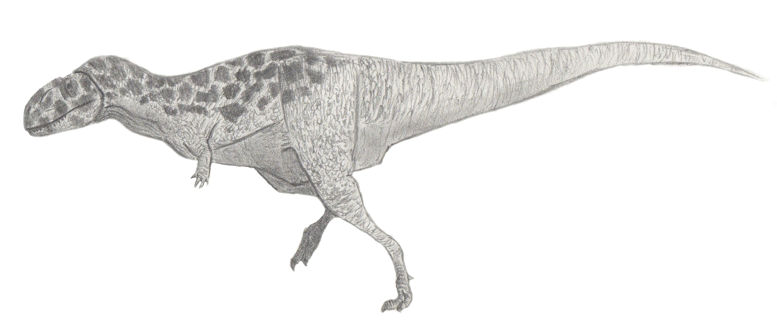 Reconstitution de Bahariasaurus